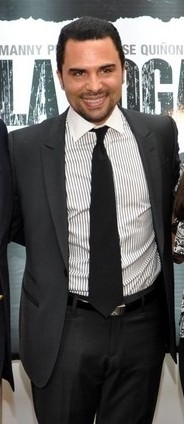 Manny Pérez, actor y guionista de cine dominicano por Reynaldo Brito de .